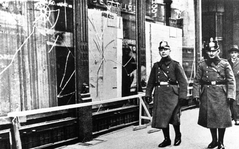 Schaufensterscheiben von jüdischen Geschäften wurden zertrümmert, Geschäft Grünfeld in der Leipziger Strasse [in Berlin]. Die Hüter der Ordnung waren machtlos oder sie schritten nicht ein.